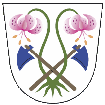 Znak obce Vápenice